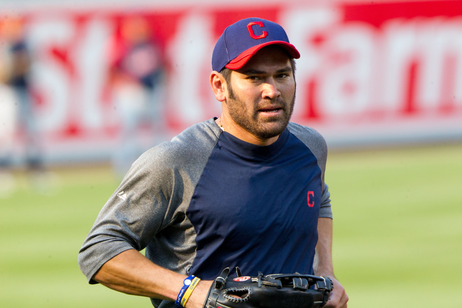 Johnny Damon